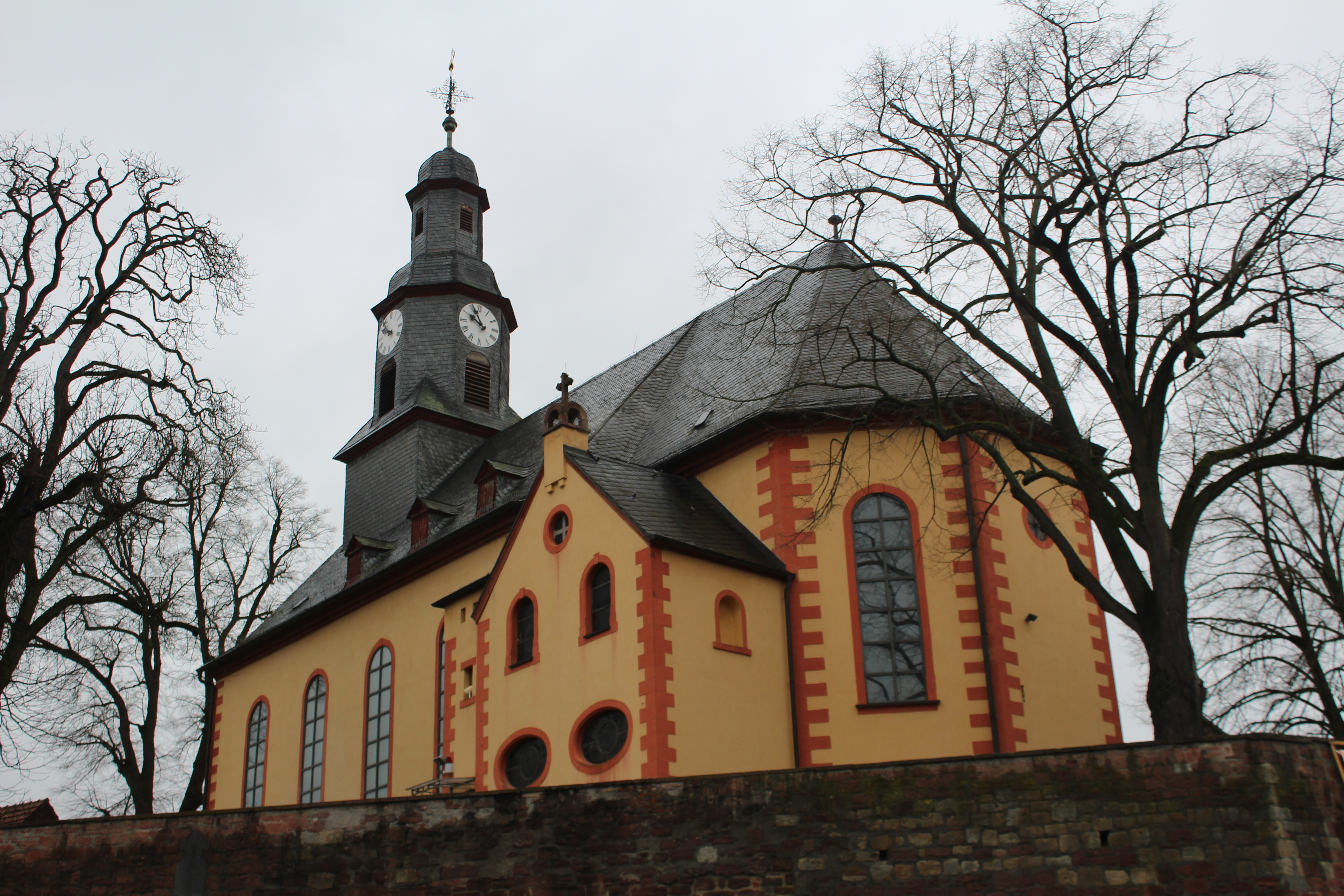 Kath. Kirche Mariä Verkündigung, Heldenbergen, Nidderau, Main-Kinzig-Kreis, Hessen, Deutschland